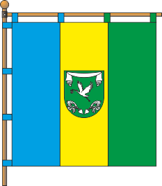 Прапор смт Радісне